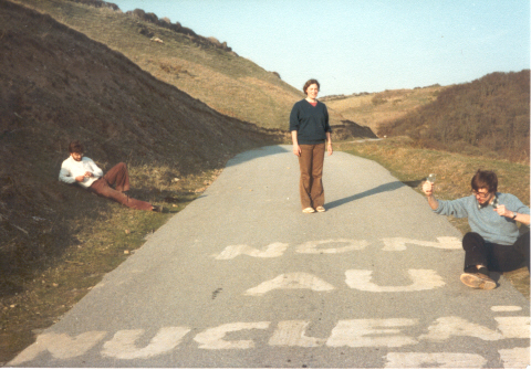 La Hague 1979, non au nucleaire